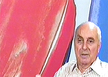 Portrait de Olivier Debré